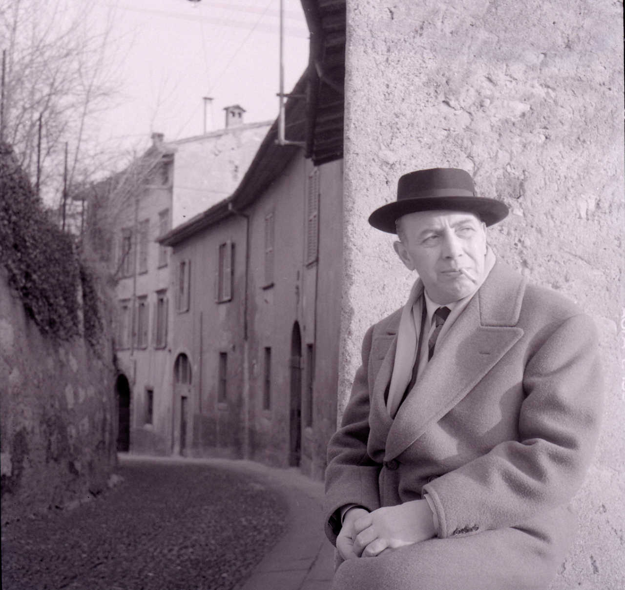 Servizio fotografico : Italia, 1982 / Paolo Monti. - Buste: 7, Fototipi: 7 : Negativo b/n, gelatina bromuro d'argento/ pellicola ; 6x6. - ((Serie costituita da 7 buste di carta, tenute insieme da una graffetta, identificate con i nn.: R4165/ 1, R4166/ 2, R4167/ 3, R4168/ 4, R4169/ 5, R4170/ 6, R4171/ 7. - Sulla busta R4165: "Bonfanti"